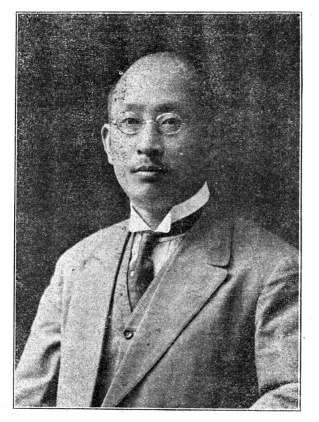 中華民國國會議員